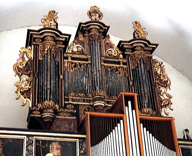 Torrlösa Mariakyrka i Skåne, Sverige. Buxtehude-orglet